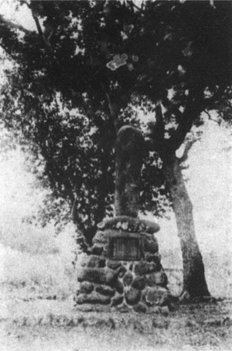 中文（台灣）: 乃木希典率領第二師團於1895年10月11日從枋寮登陸台灣，地點在後來的枋寮公學校附近。此碑於1923年10月設立。